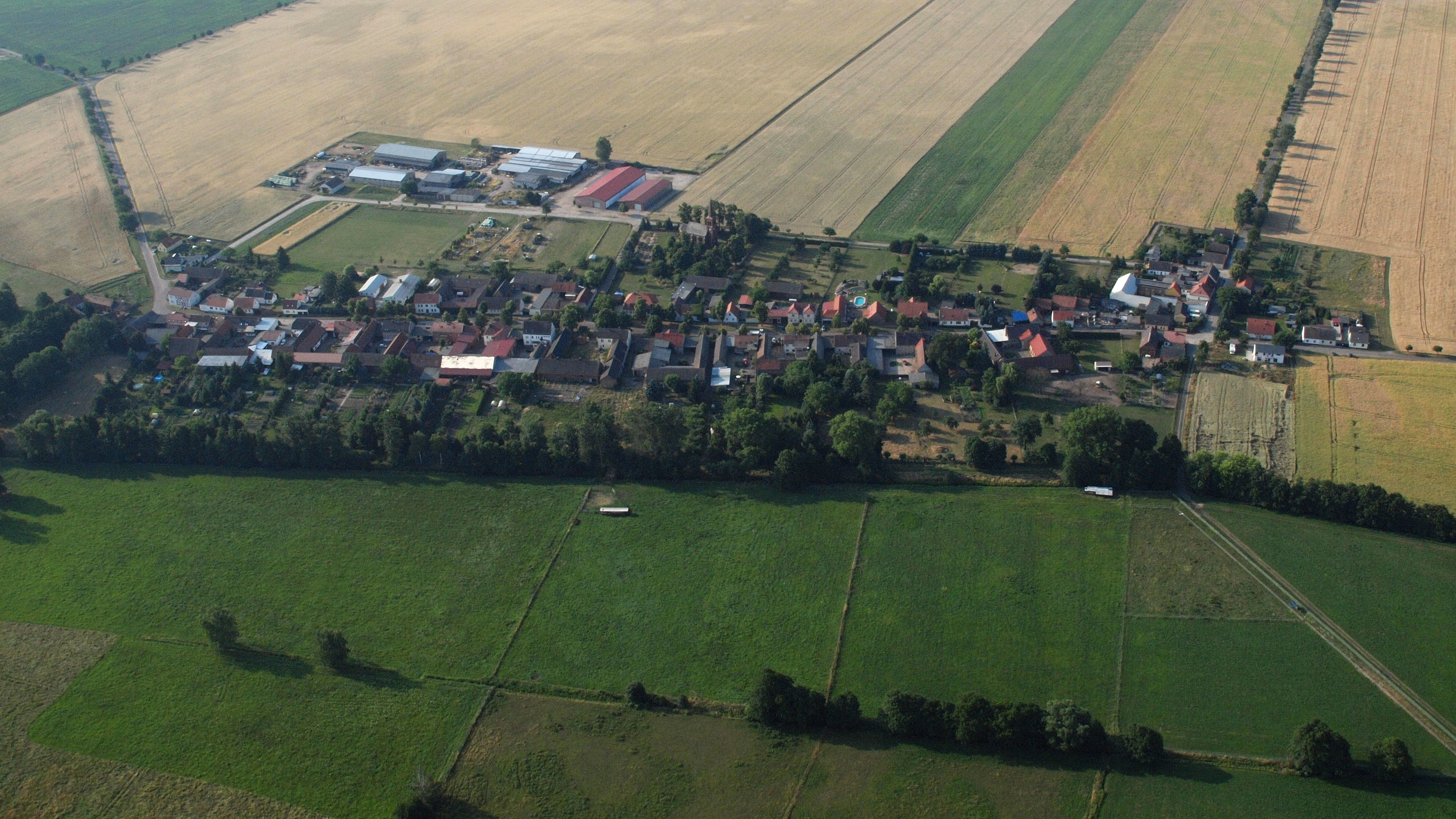 Bornum (Zerbst), Luftaufnahme (2015)